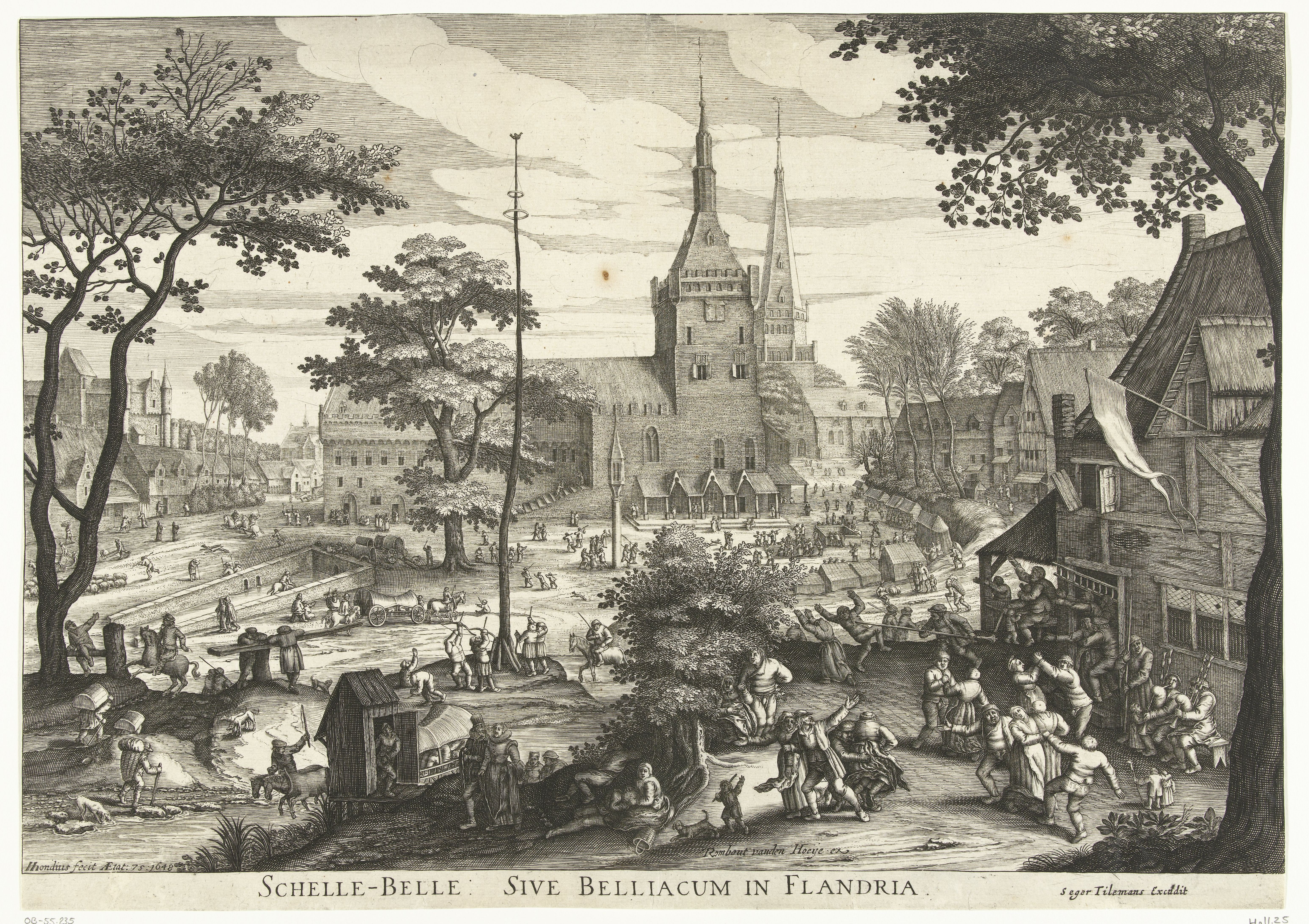 Schelle-Belle: Sive Belliacum in Flandria Gravure uit 1648 van Hendrick Hondius (I), 295 mm × 415 mm Dorpsfeest in Schellebelle met vogelschieten Ondanks het onderschrift is in werkelijkheid Bailleul (Belle) afgebeeld, met herkenbaar belfort